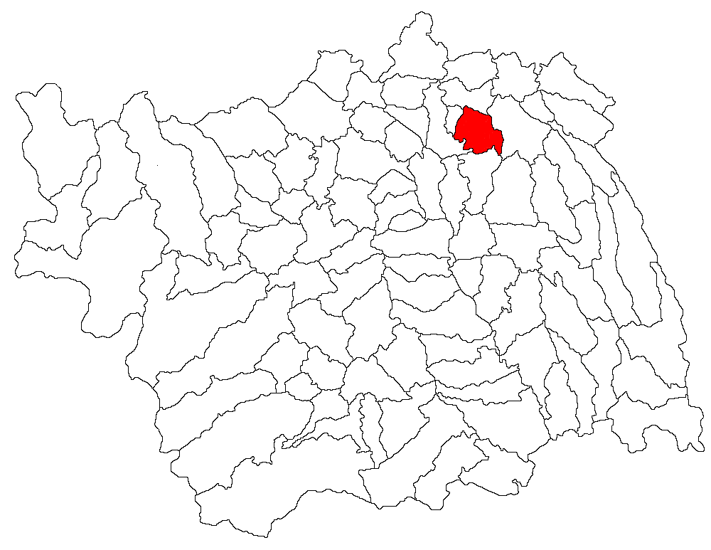 Categorie:Hărţi ale judeţului Bacău